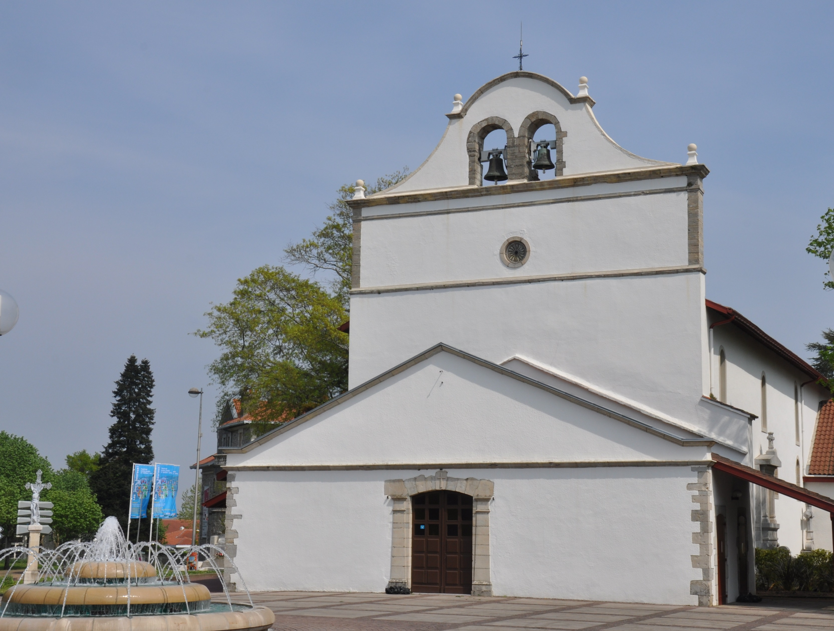 Eglise Saint-Léon